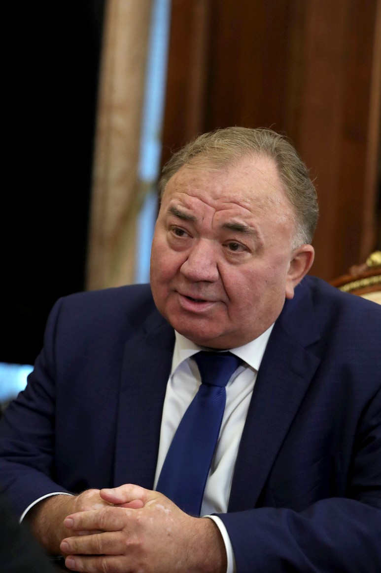 Калиматов, Махмуд-Али Макшарипович, глава Республики Ингушетия